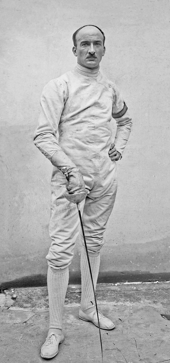 Tainturier, de Paris [épéiste, participant au championnat de France, Luna Park, 15 juin 1922] : [photographie de presse] / [Agence Rol]